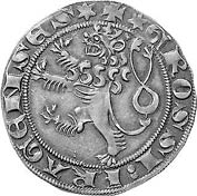 Grosz praski Wacława II. Rewers. autor: mzopw licencja: GNU FDL